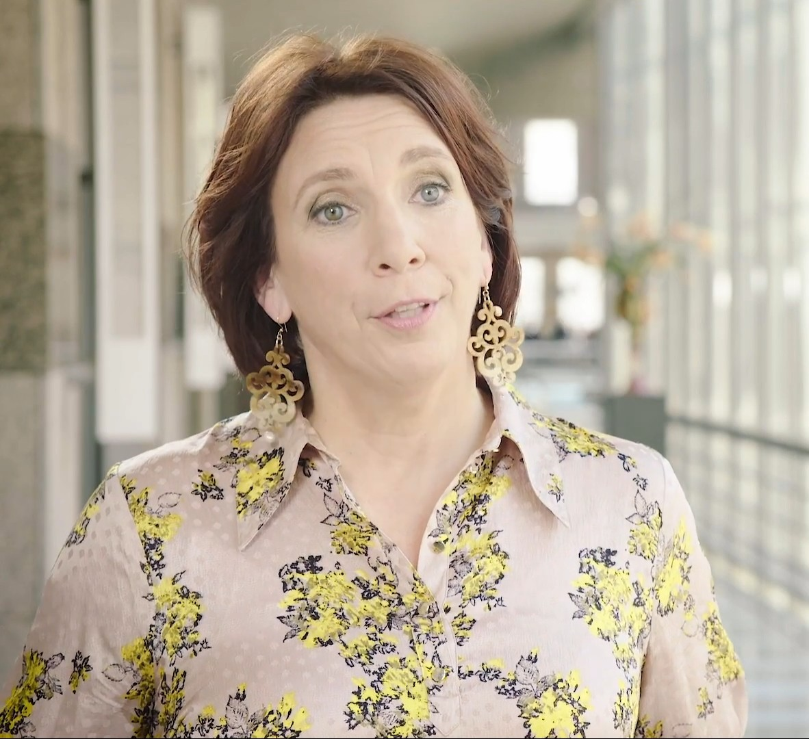 Wat doet de commissie VWS? De zorgsector is het beleidsterrein waarover de commissie zeer regelmatig overlegt met de minister en staatssecretaris van Volksgezondheid, Welzijn en Sport (VWS). Deze bewindspersonen zijn verantwoordelijk voor de regelgeving in de zorgsector, de toegankelijkheid, de betaalbaarheid en de kwaliteit daarvan.